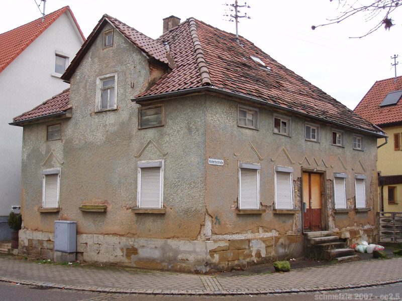 Haus Bohl in Heilbronn-Frankenbach, denkmlageschütztes Gebäude mit auffälliger Fassadengestaltung.